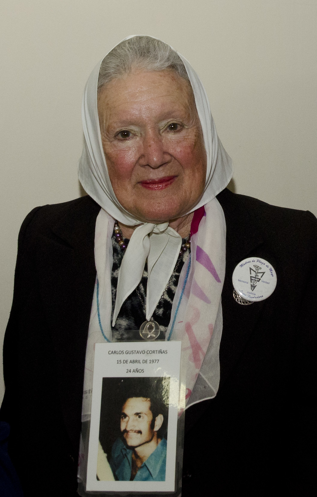 Buenos Aires, 7 de octubre de 2014.- El secretario de Políticas Socioculturales, Franco Vitali, inauguró esta tarde en el Cine Gaumont, Espacio INCAA Km 0, la 5.° edición del Festival Internacional CineMigrante, organizado, en el marco de la semana de la diversidad cultural, por el Ministerio de Cultura de la Nación, el Instituto Nacional de Cine y Artes Audiovisuales (INCAA), la Secretaría de Derechos Humanos de la Nación y el Centro Cultural de la Cooperación. Del acto de apertura participaron, además, el subsecretario de Promoción de Derechos Humanos de la Nación, Charly Pisoni, el gerente de Acción Federal del INCAA, Félix Fiore, y la directora del Festival, Florencia Mazzadi. Este año se proyectan más de 75 películas de todo el mundo, que abordan de manera transversal los diferentes aspectos en torno a la migración, al cumplimiento efectivo de los derechos humanos en este ámbito y a la construcción de la identidad en el mundo actual. Foto: Augusto Starita / Ministerio de Cultura de la Nación.